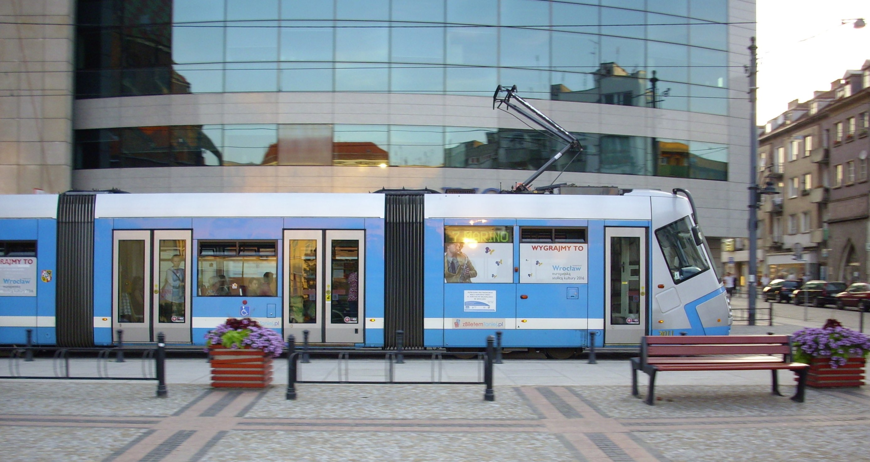 Škoda 16T na linii 7 na ul. Szewskiej we Wrocławiu.